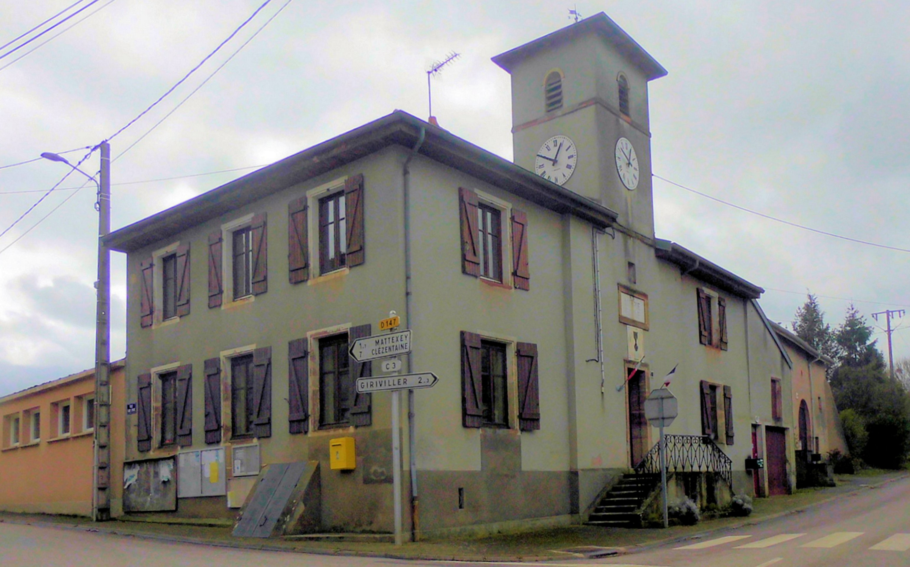 La mairie-école de Seranville